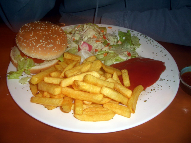 Veganer Burger mit Pommes vom Restaurant "Kopfeck" in München